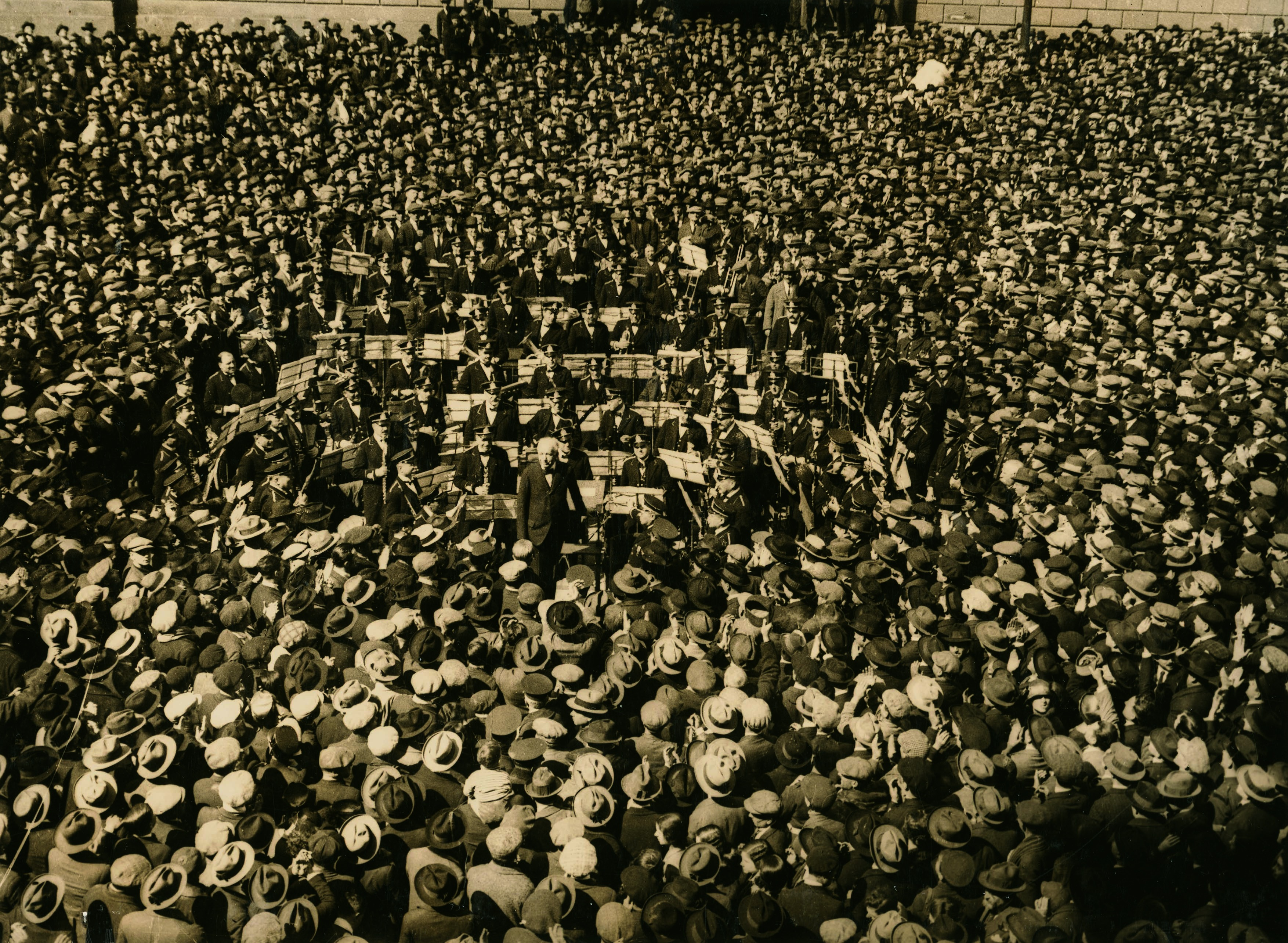 El compositor Richard Strauss dirigeix la Banda Municipal de Barcelona.Plaça de Sant Jaume de 1925. (15 March)